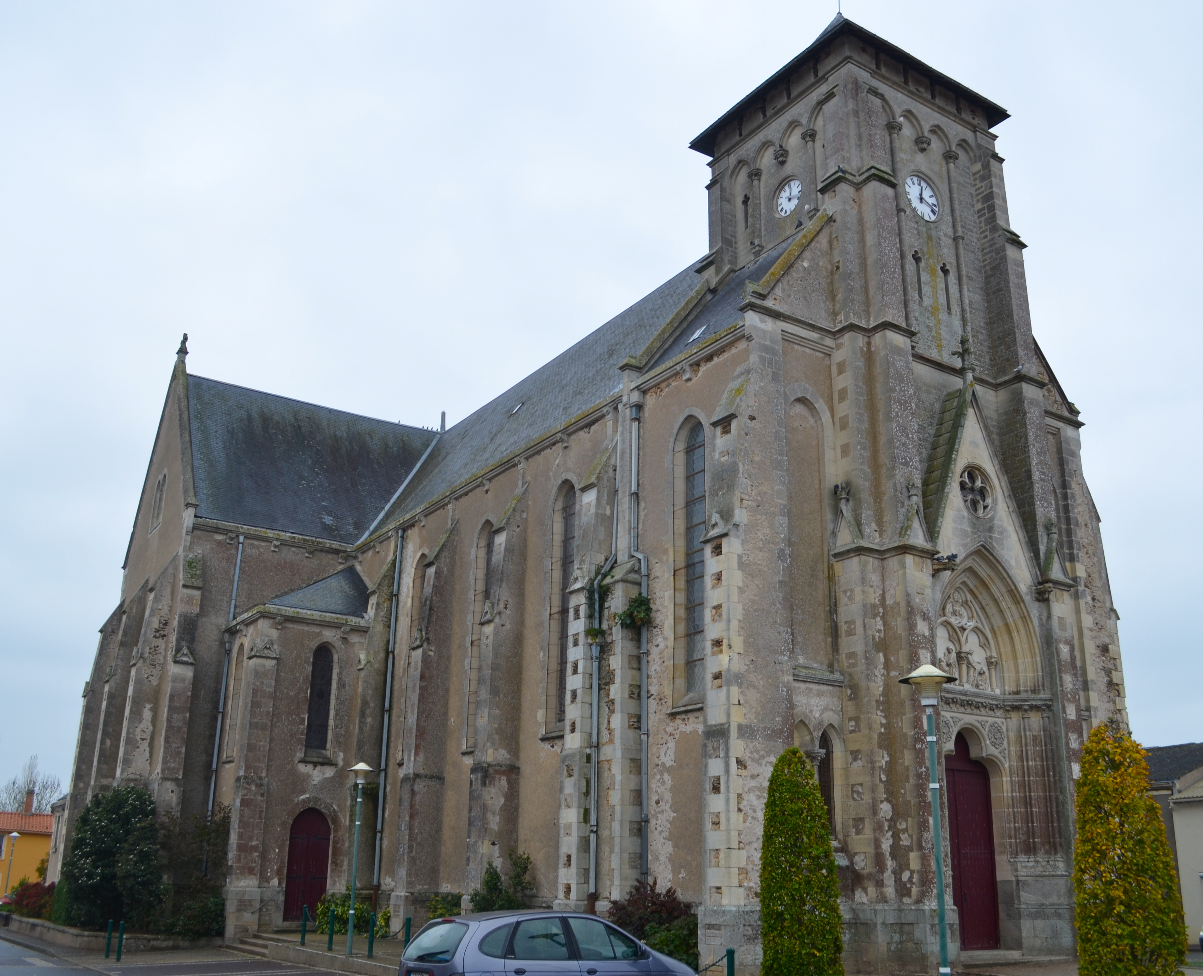 Eglise de Paulx (Loire-Atlantique)